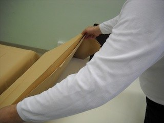 Eindecken von Gasttischen; hier Auflegen der Tischwäsche.